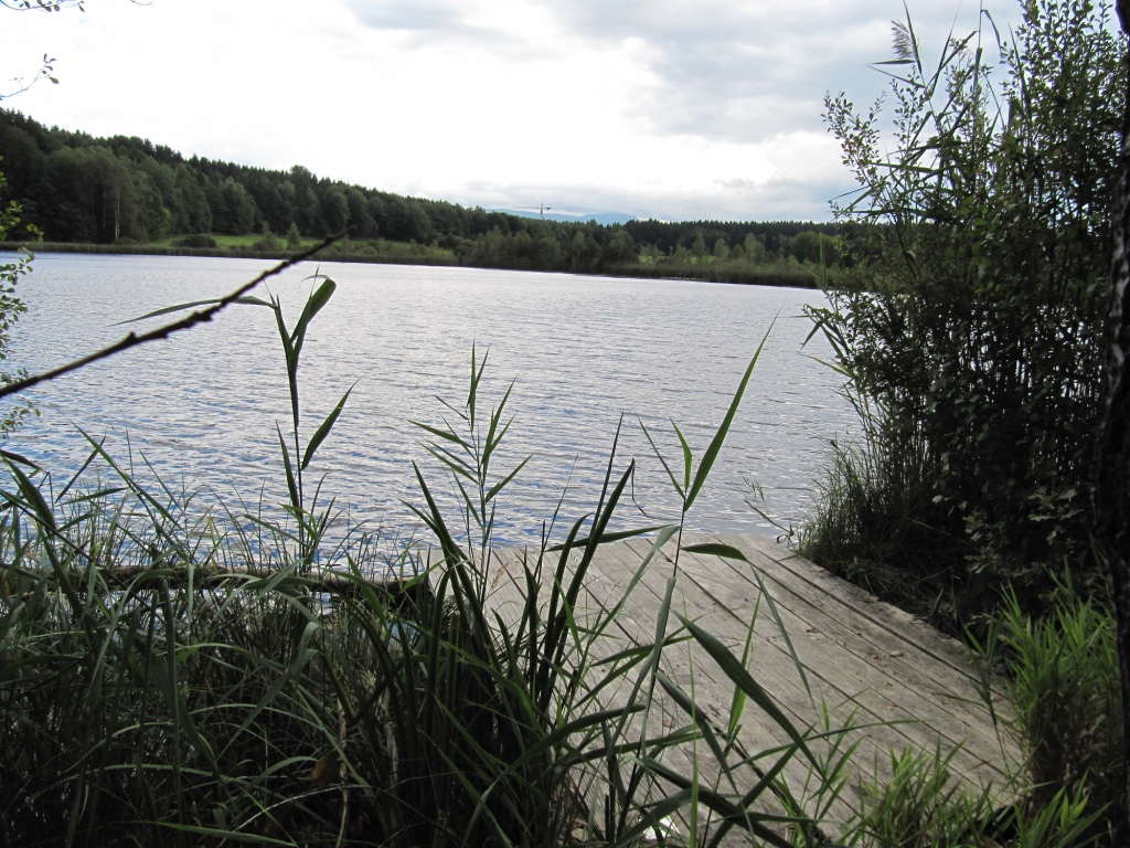 Siferlinger See, Blick in Richtung Hochries